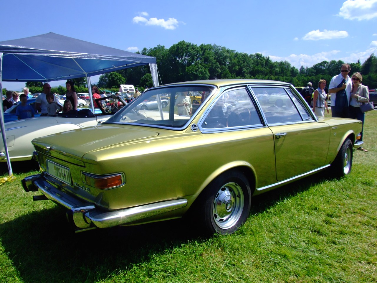 Quelle: selbst fotografiert, 06/2007 Fotograf: Späth Chr.